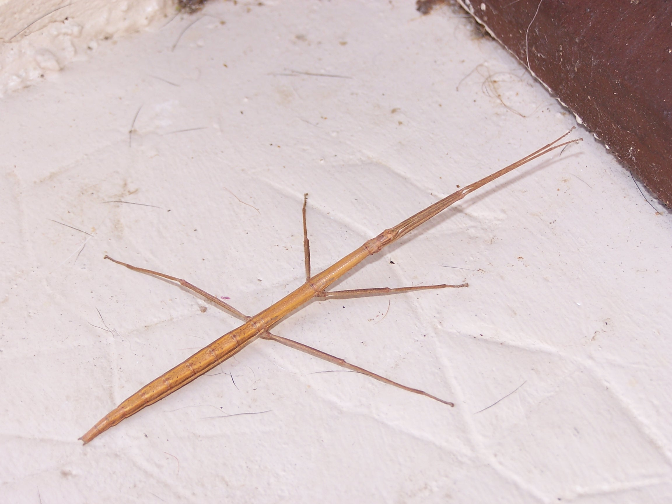 Photographie d'un phasme, et plus précisément d'un Phasme Gaulois (Clonopsis gallica), qui est commun sur toute la moitié Sud de la France et le long du littoral Atlantique jusqu'en Bretagne.